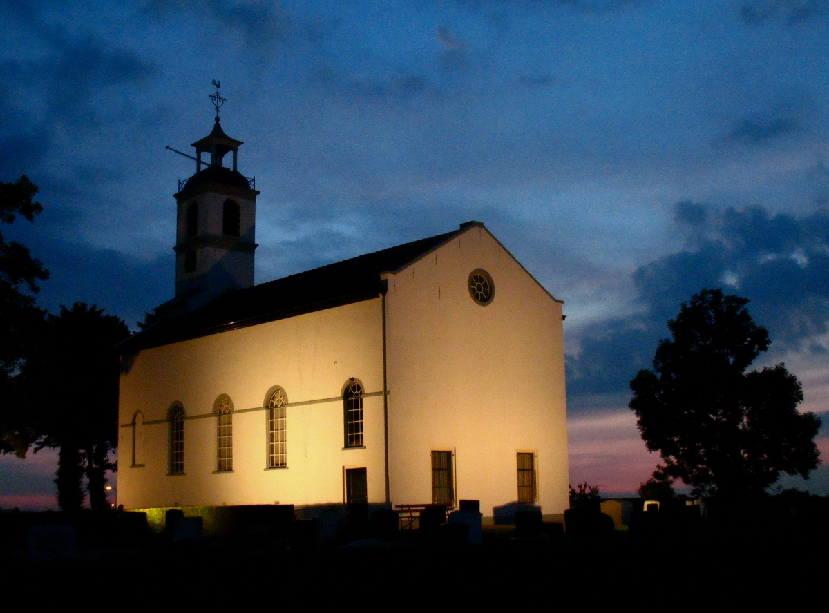 Protestantse kerk Simonshaven/Biert te Simonshaven in de gemeente Bernisse, Zuid-Holland